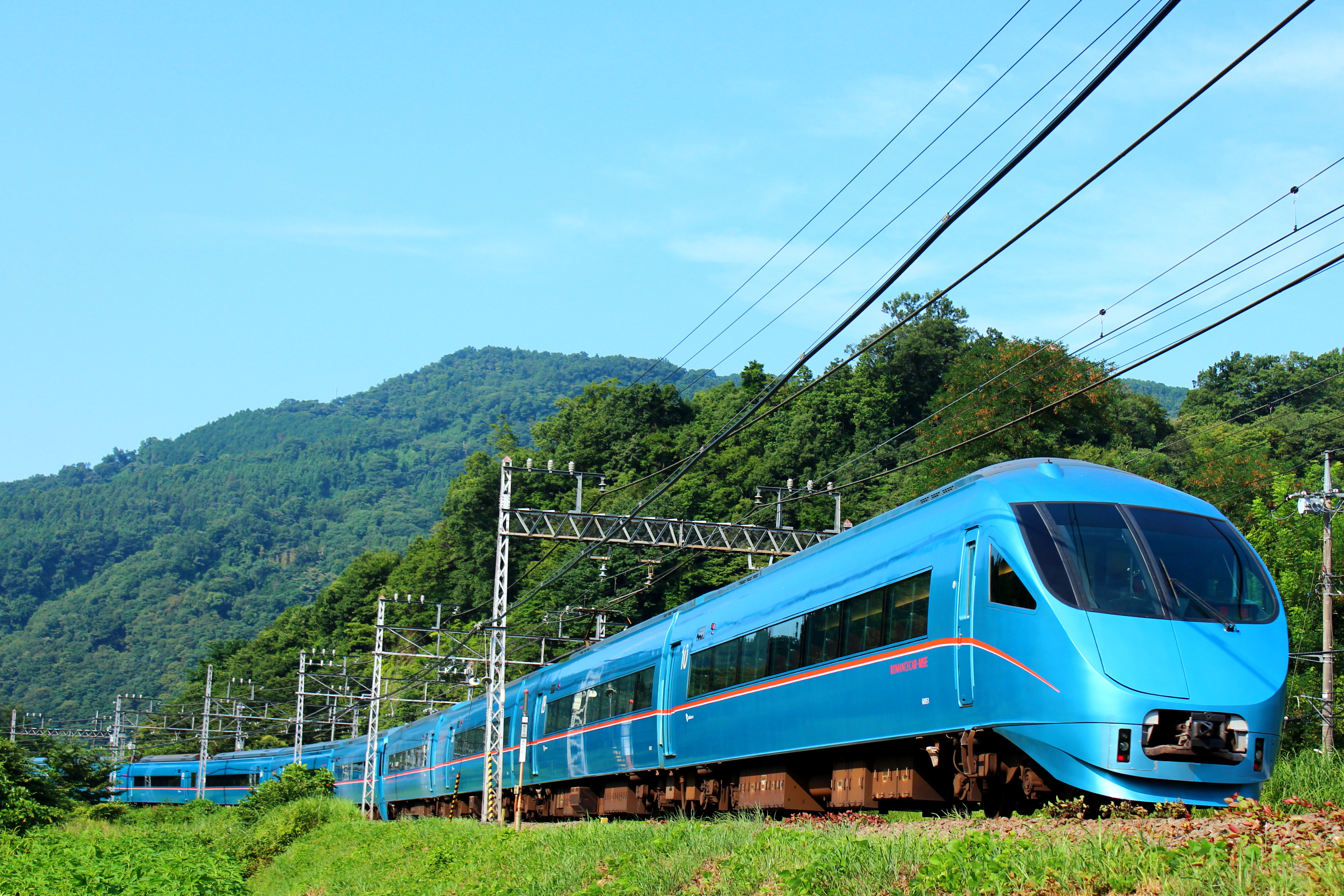 小田急電鉄 特急形ロマンスカー60000形MSE